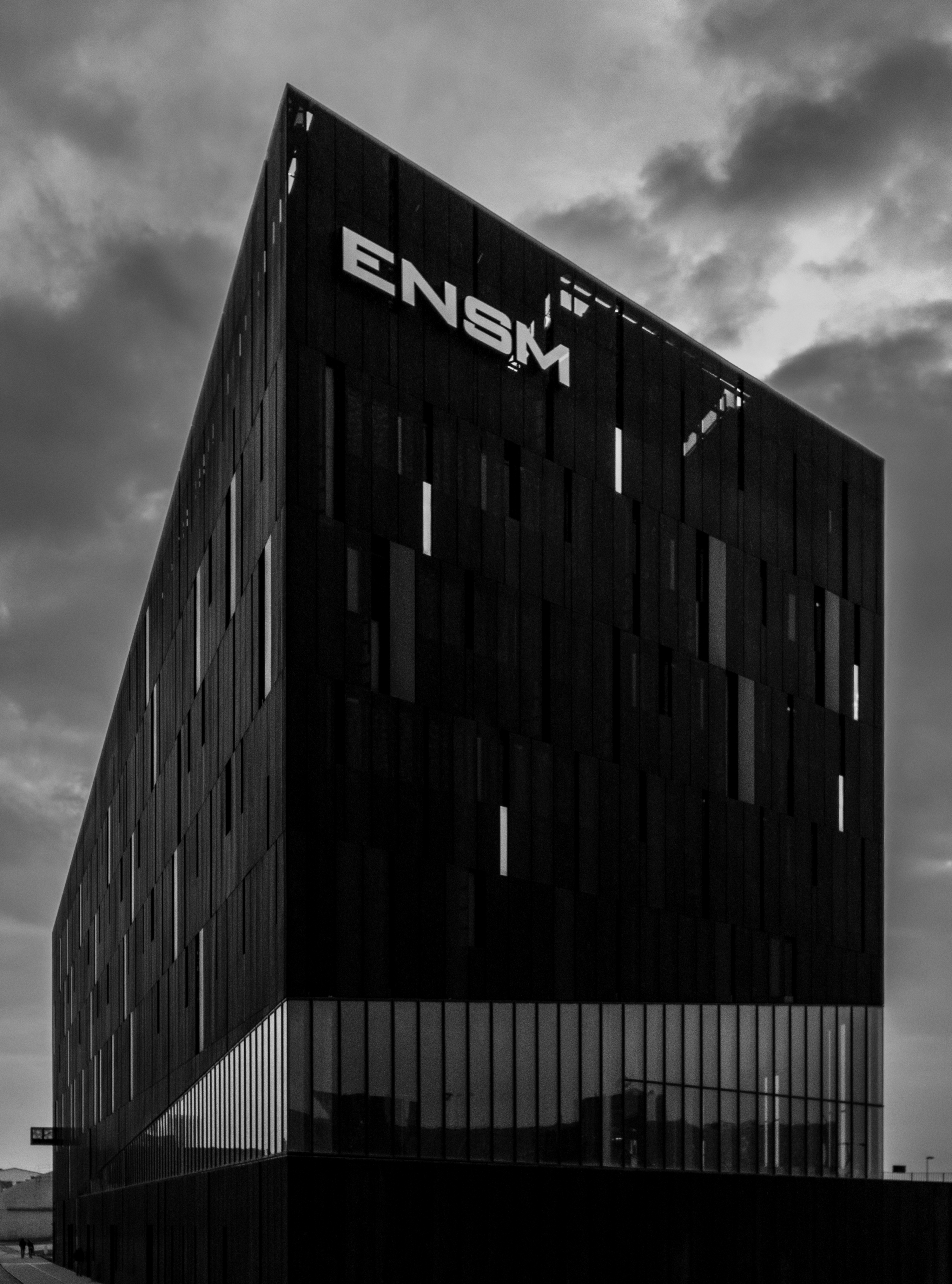 Bâtiment de l'ENSM du Havre